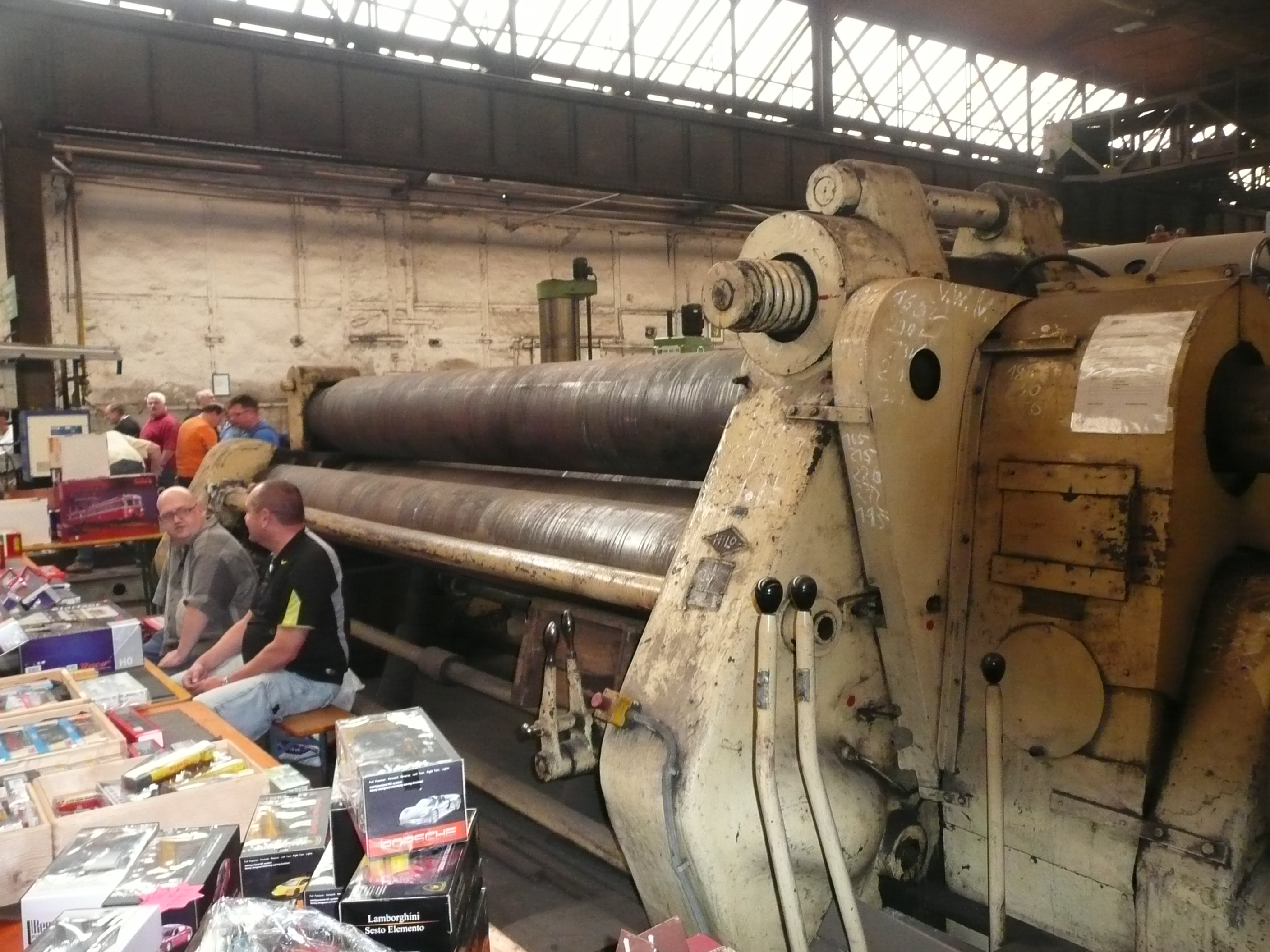 Blecheinwalzmaschine in der Kesselschmiede des Werkes Meiningen